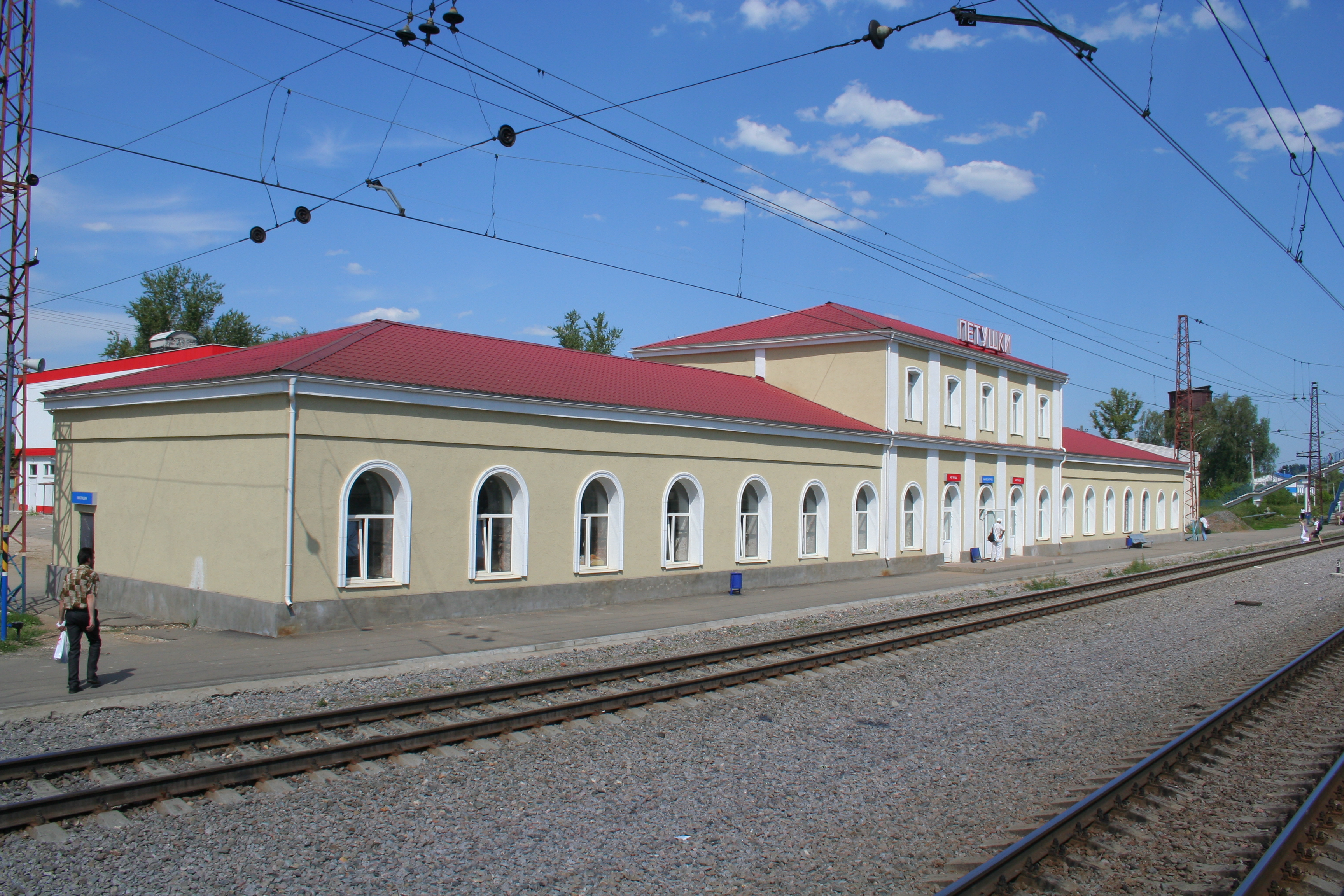 Bahnhofsgebäude in Petuschki, Oblast Wladimir, Russland.